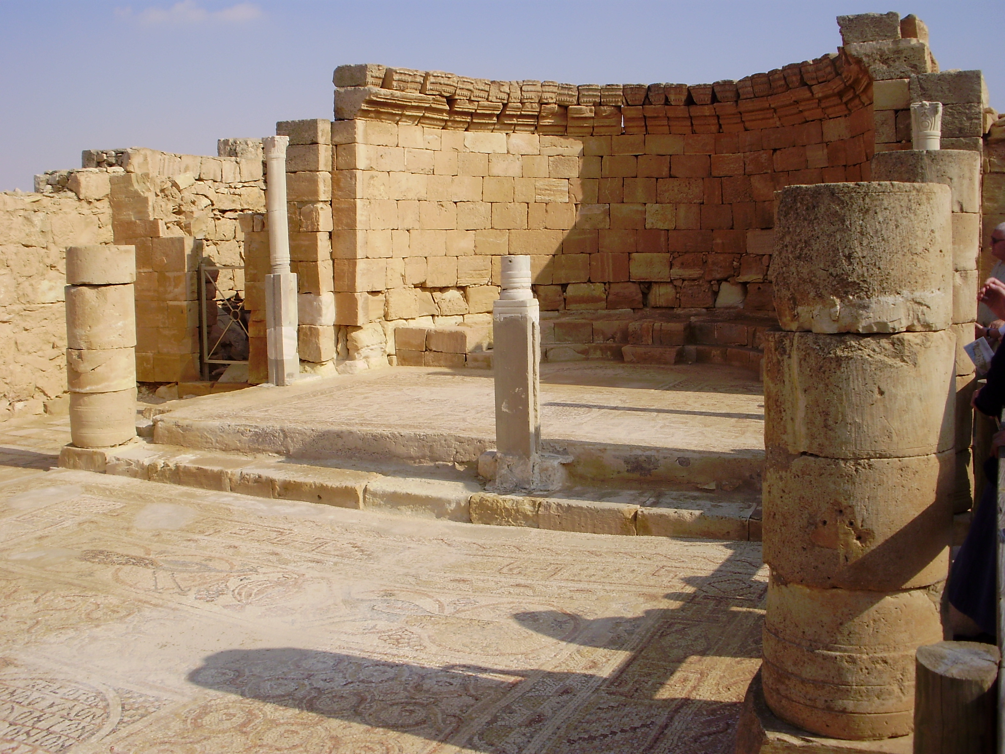 Site archéologique de Mamshit.